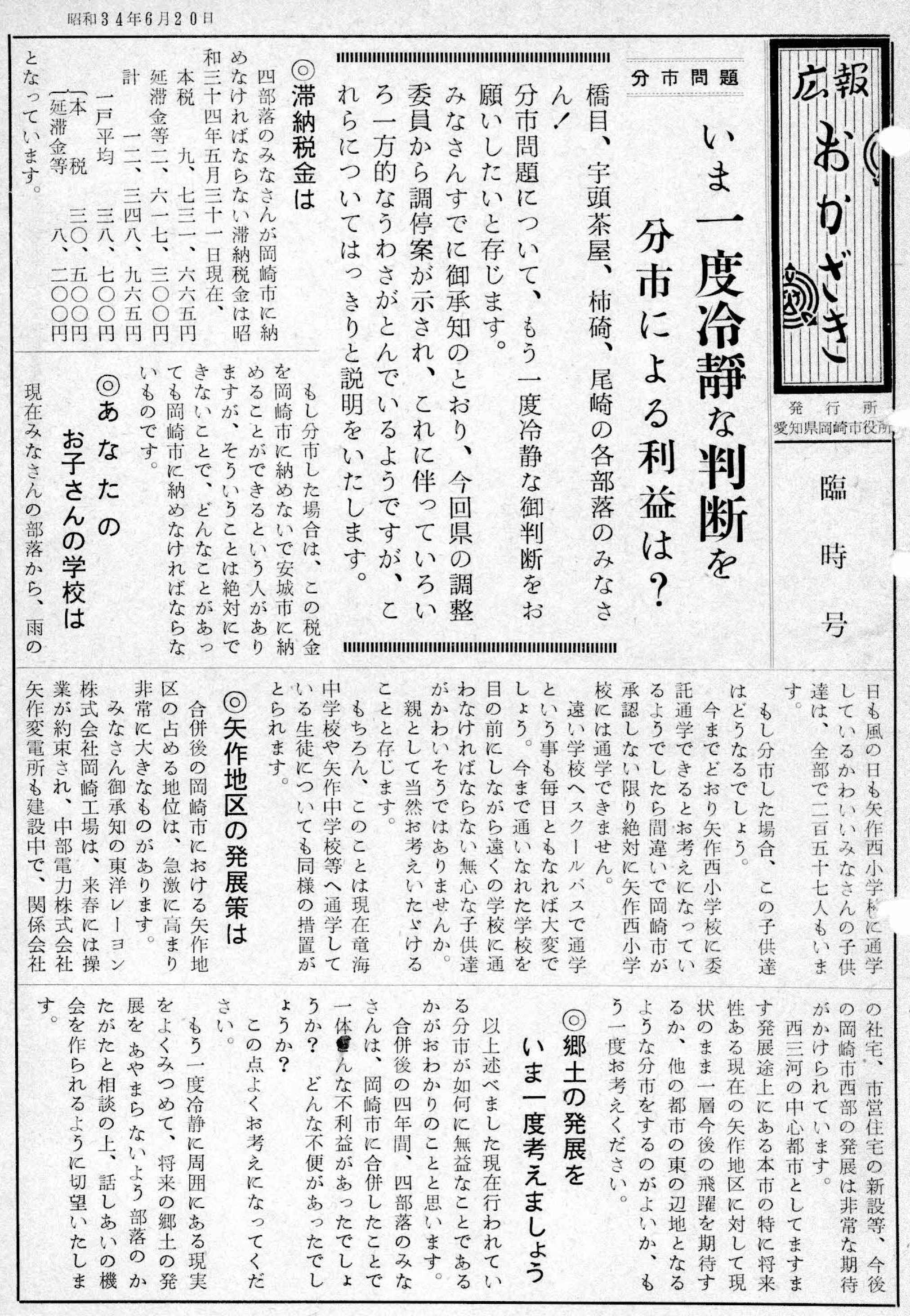 河野町、宇頭茶屋町、尾崎町、柿碕町、橋目町の一部の住人に分市を思いとどまるようすすめる『広報おかざき』臨時号。